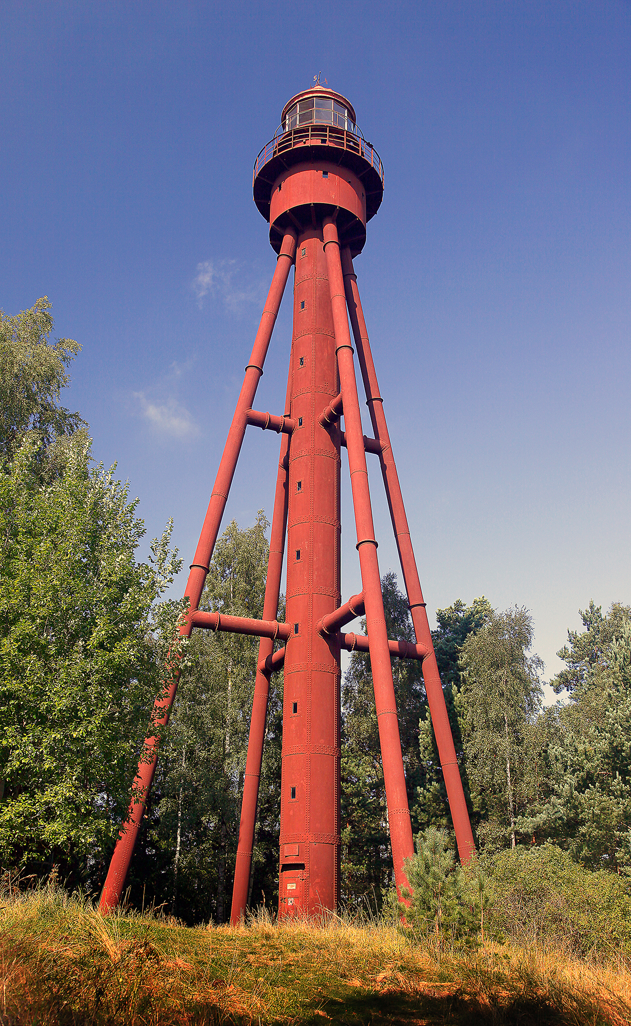 Ruhnu tuletorn 09